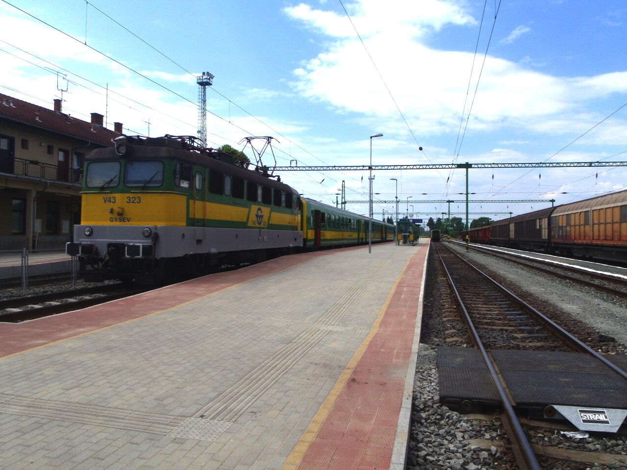 Bahnhof Szentgotthárd